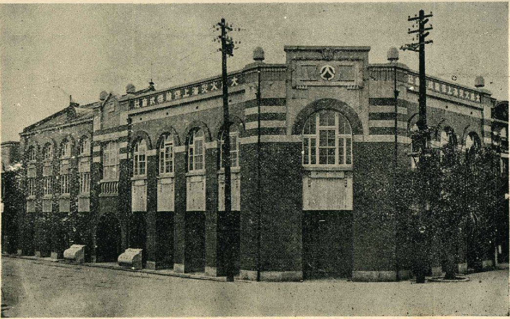 中文（台灣）: 昭和時期大成火災2